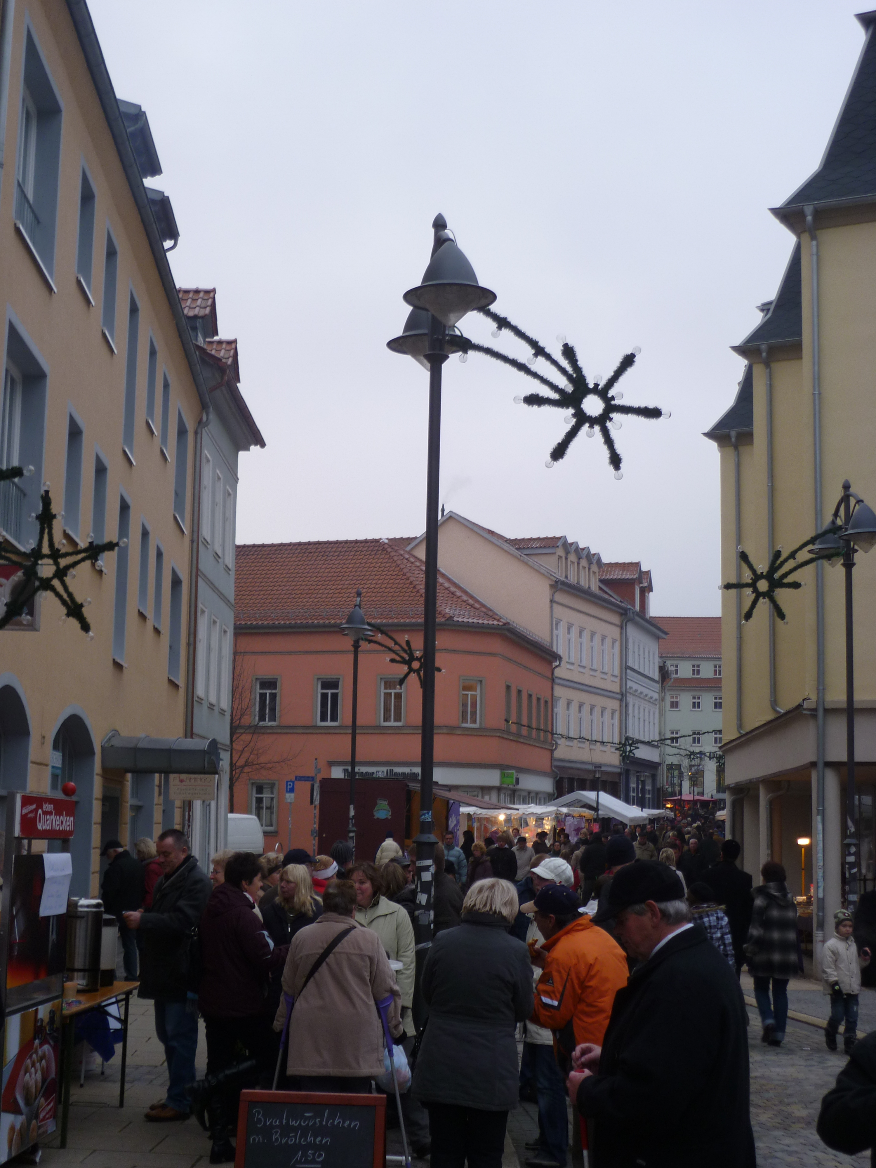 Innenstadt Sondershausens zum Adventsmarkt 2010